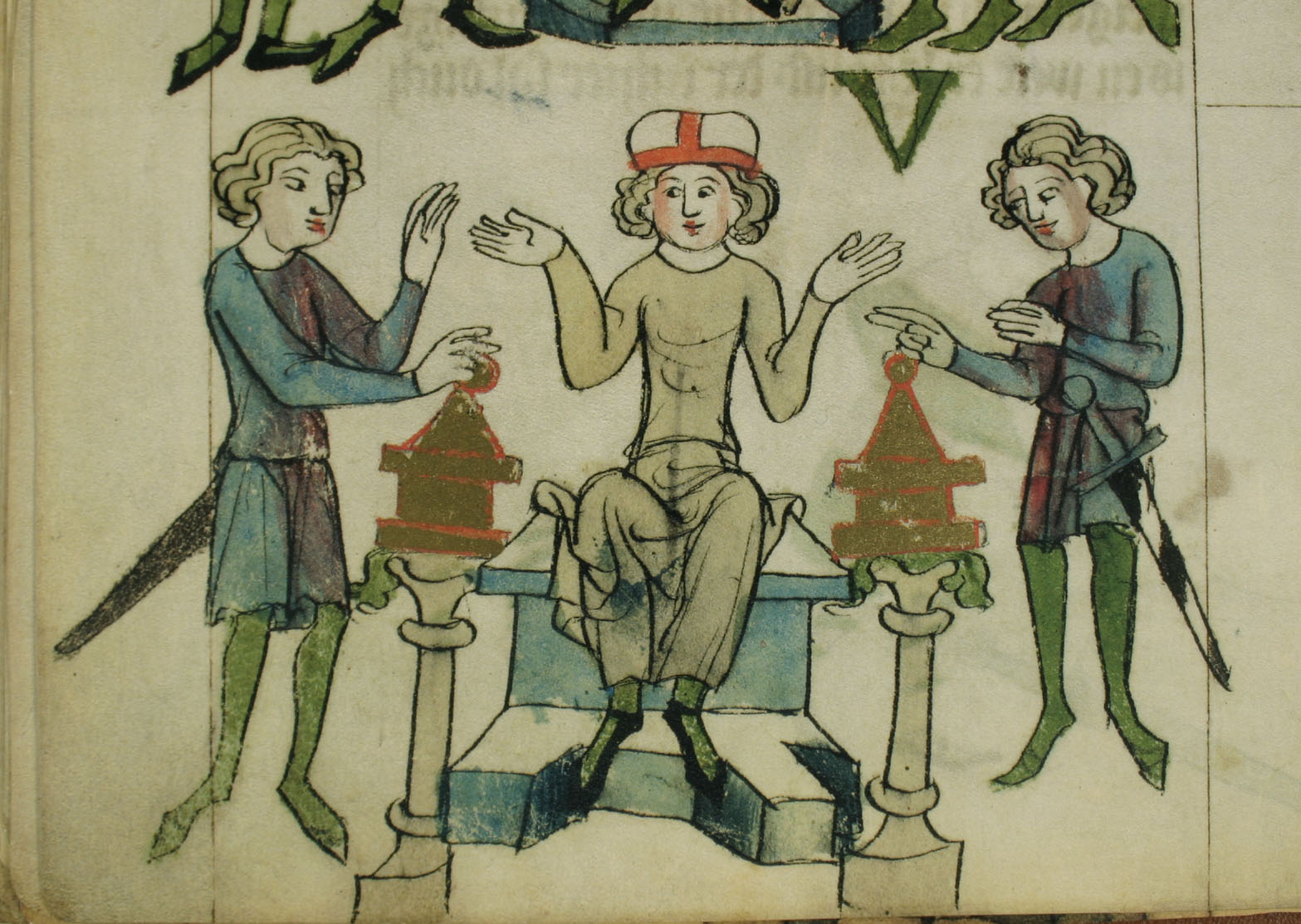 Eid auf die Reliquien